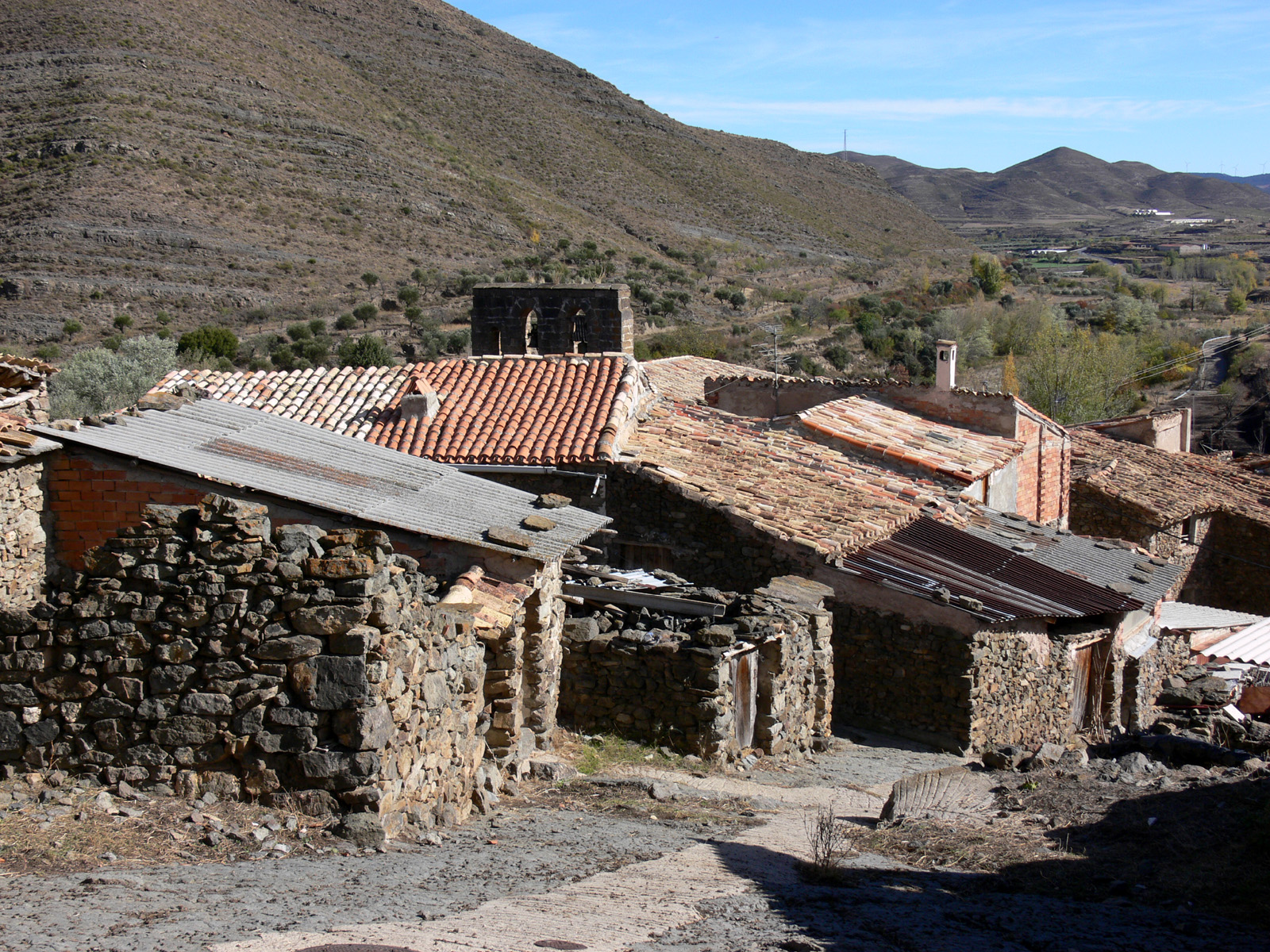 Valdeperillo, aldea de Cornago (La Rioja - España).